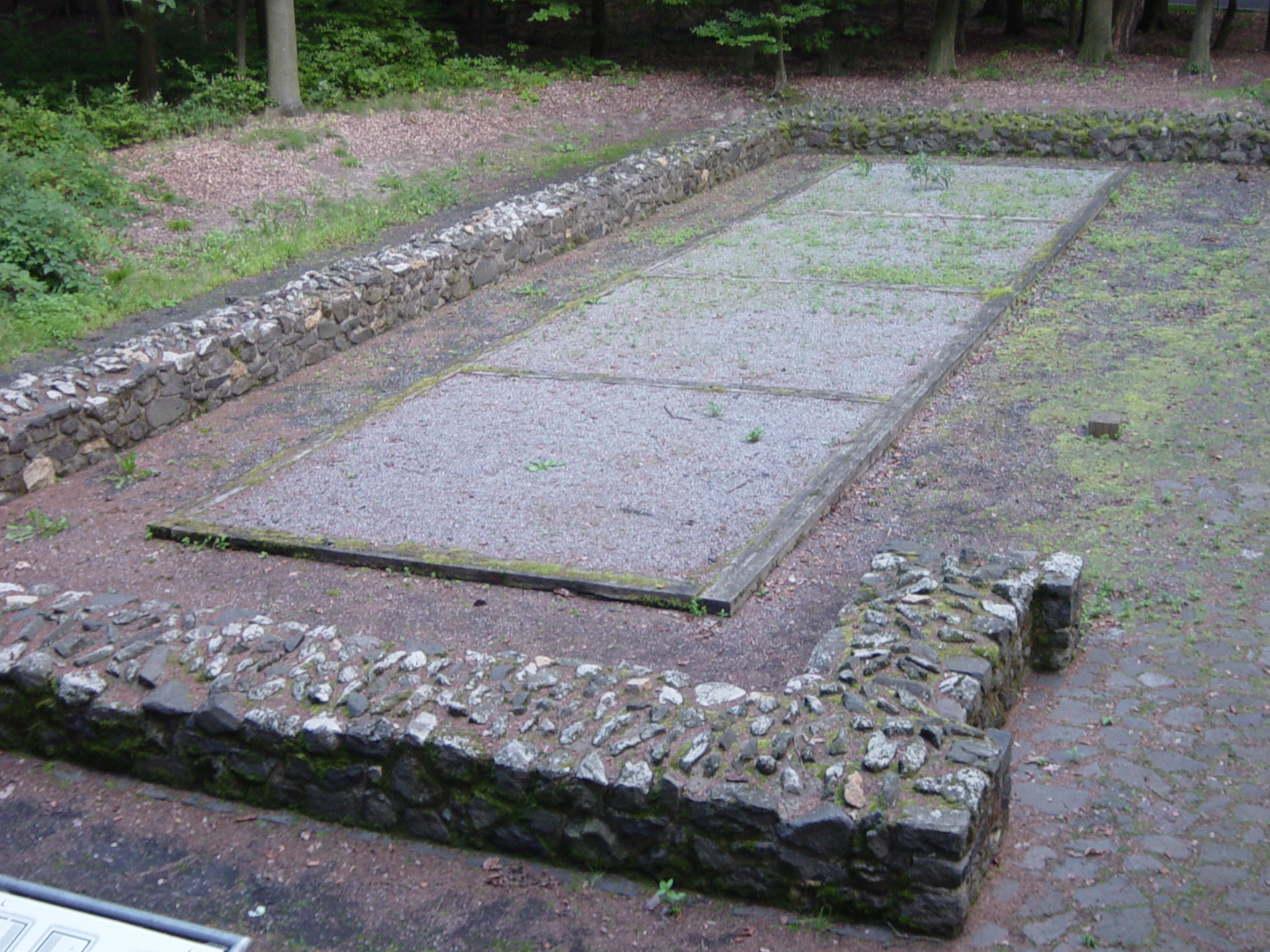 Römisches Kleinkastell am Obergermanisch-Raetischen Limes, Grundfläche von vier Baracken